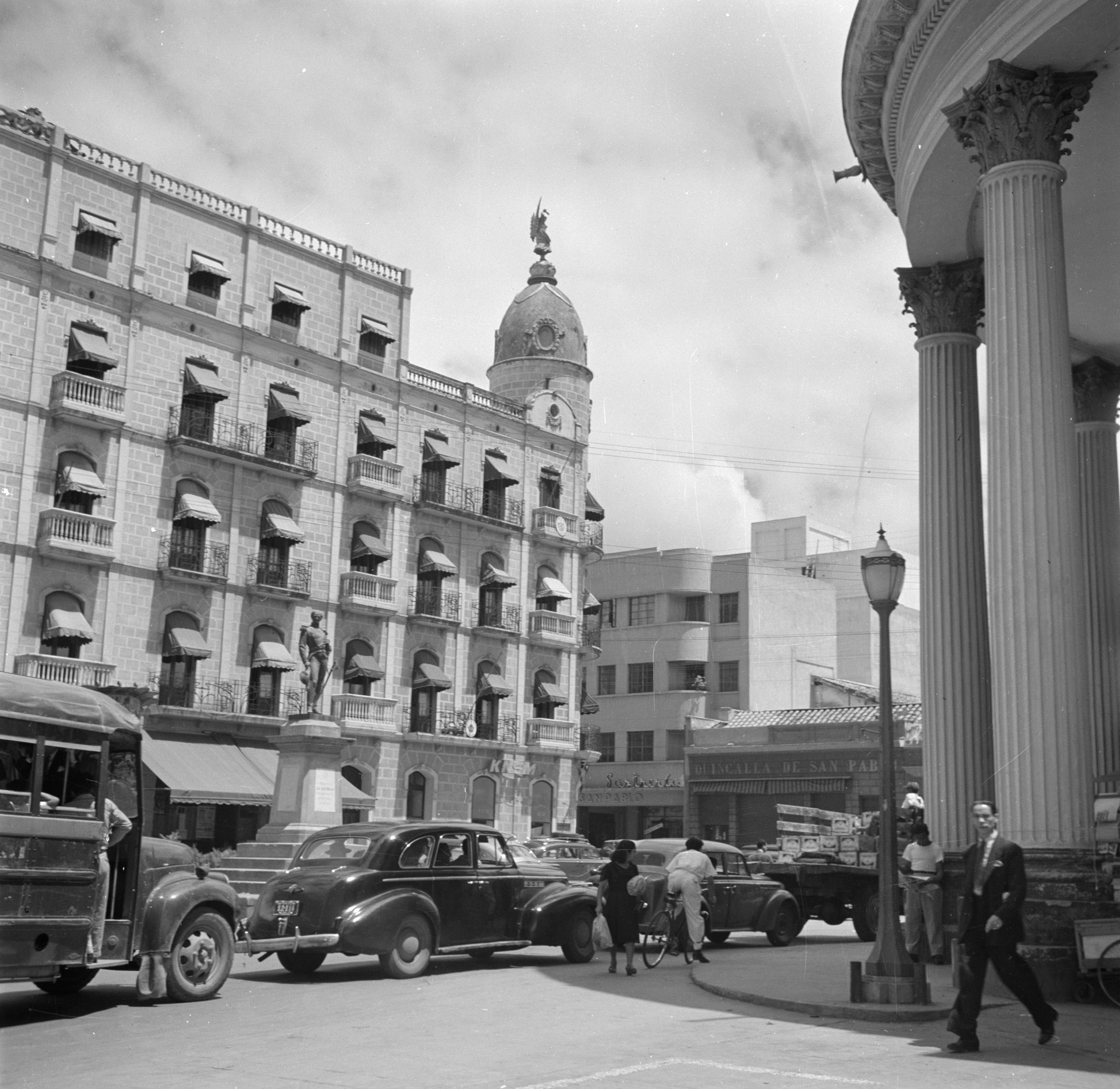 Collectie / Archief : Fotocollectie Van de Poll Reportage / Serie : Reis naar Venezuela en het Oostelijk Caraïbisch gebied Beschrijving : Stadsgezicht met Hotel Majestica in Caracas in Venezuela Datum : 1948 Locatie : Caracas, Venezuela Trefwoorden : auto's, gebouwen, hotels Fotograaf : Poll, Willem van de, [onbekend] Auteursrechthebbende : Nationaal Archief Materiaalsoort : Negatief (zwart/wit) Nummer archiefinventaris : bekijk toegang 2.24.14.02 Bestanddeelnummer : 252-8437